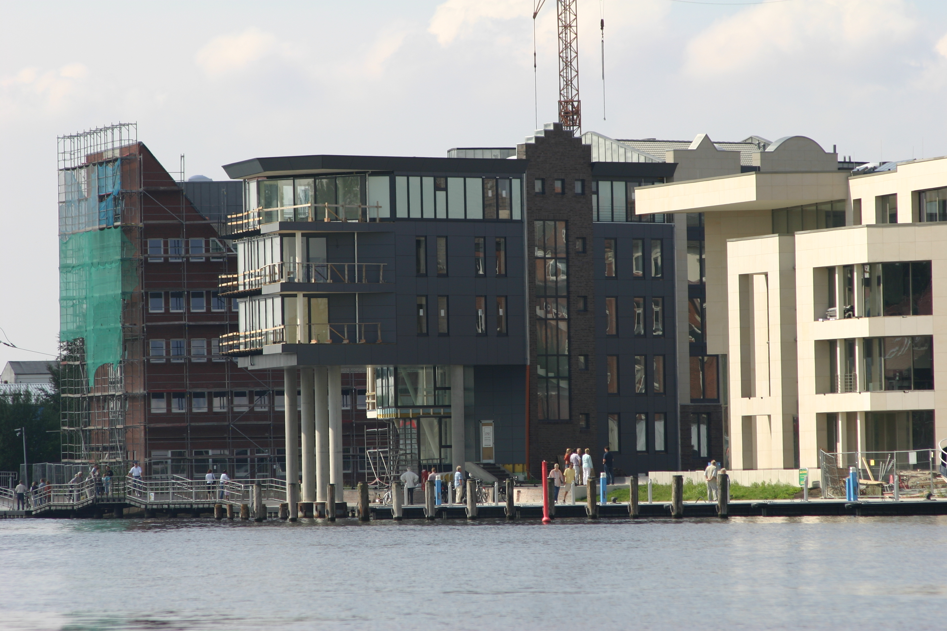 Blick auf einen Teil der "Wasserstadt am Hafentor" im Emder Binnenhafen in der Bauphase - neue Nutzung alter Hafenbrachen für Wohnen, Büros etc.